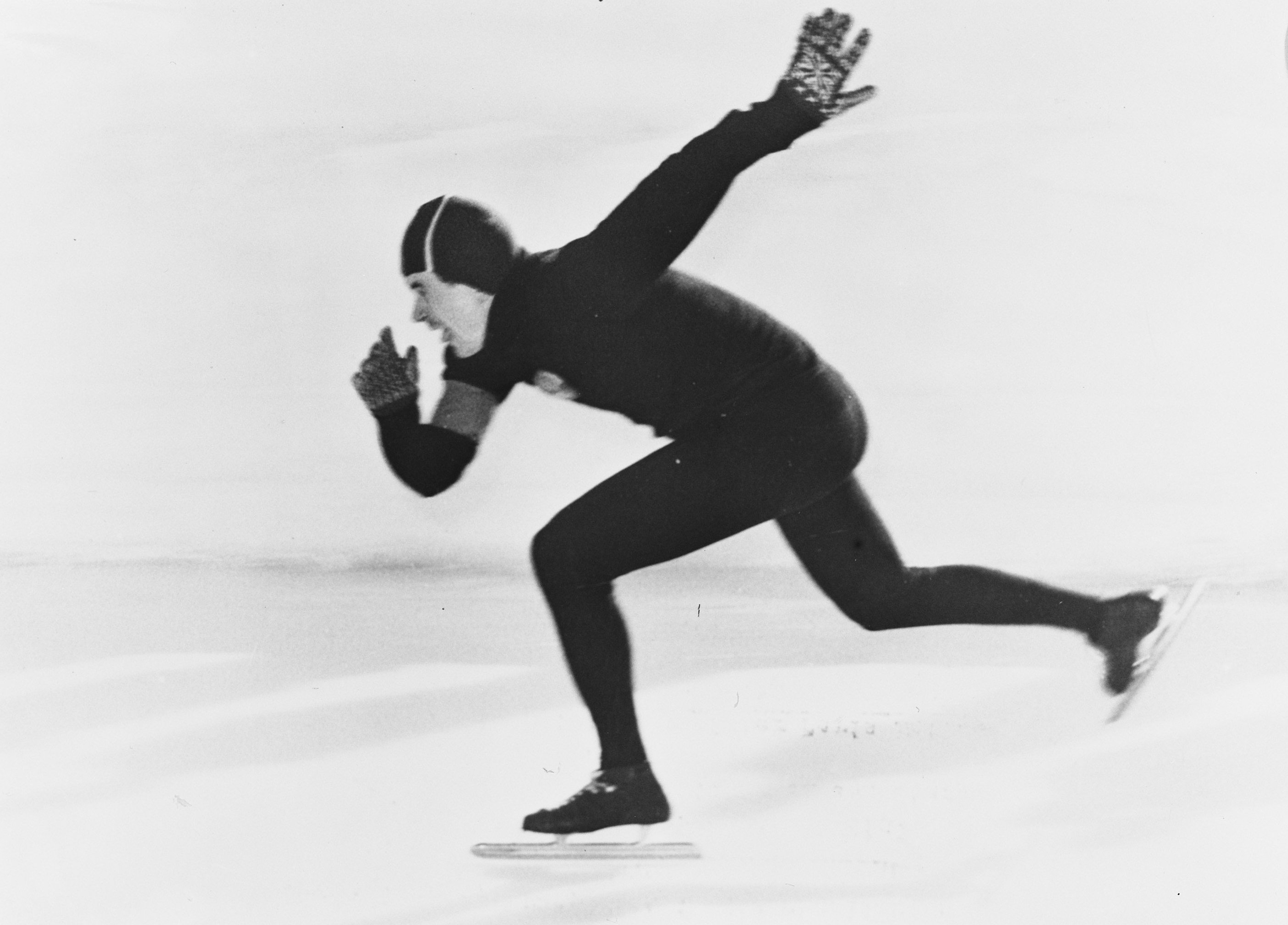 Collectie / Archief : Fotocollectie Anefo Reportage / Serie : [ onbekend ] Beschrijving : Europese kampioenschappen schaatsen heren allround in Davos. Europees kampioen Boris Shilkov (Sovjet-Unie) in actie. Datum : 7 februari 1954 Locatie : Davos Trefwoorden : schaatsen, sport Persoonsnaam : Shilkov Boris Fotograaf : Fotograaf Onbekend / Anefo Auteursrechthebbende : Nationaal Archief Materiaalsoort : Glasnegatief Nummer archiefinventaris : bekijk toegang 2.24.01.09 Bestanddeelnummer : 906-2904